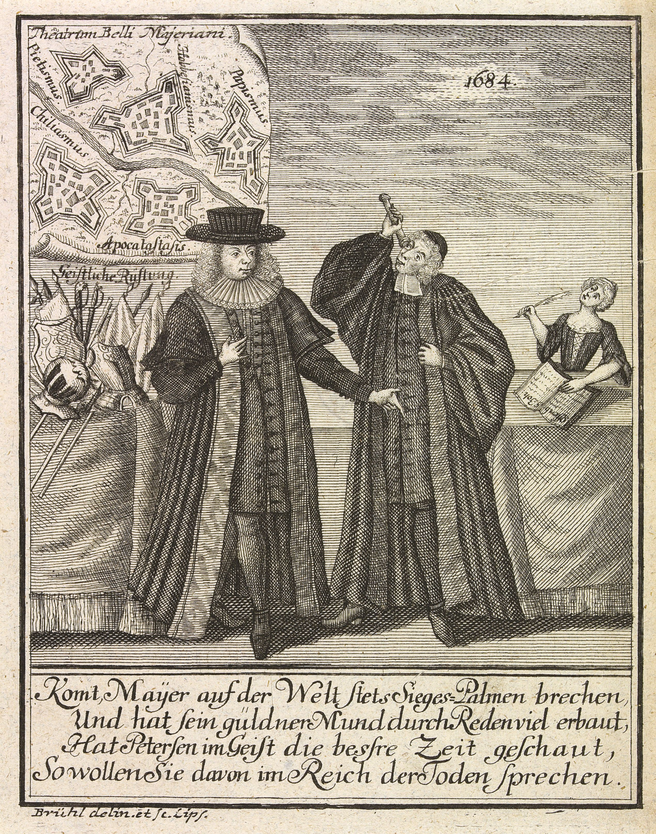 Bildnis von Johann Friedrich von Mayer